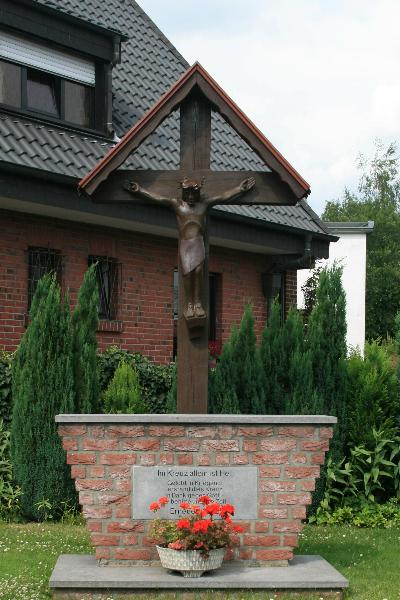 Gedenkkreuz in Wegberg-Beeckerheide